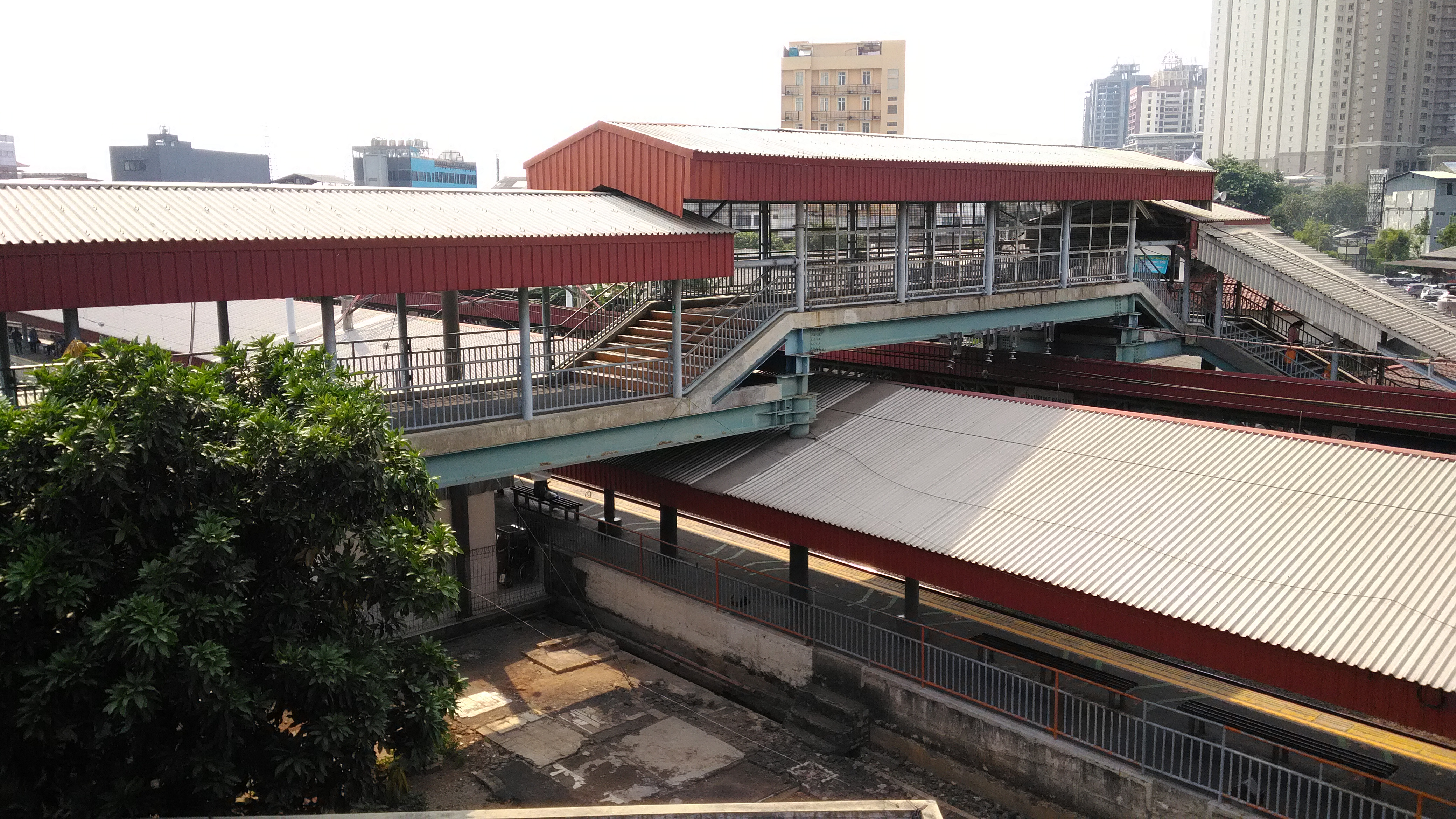 Sunda: Stasion Kampung Bandan Bagian Luhur 2